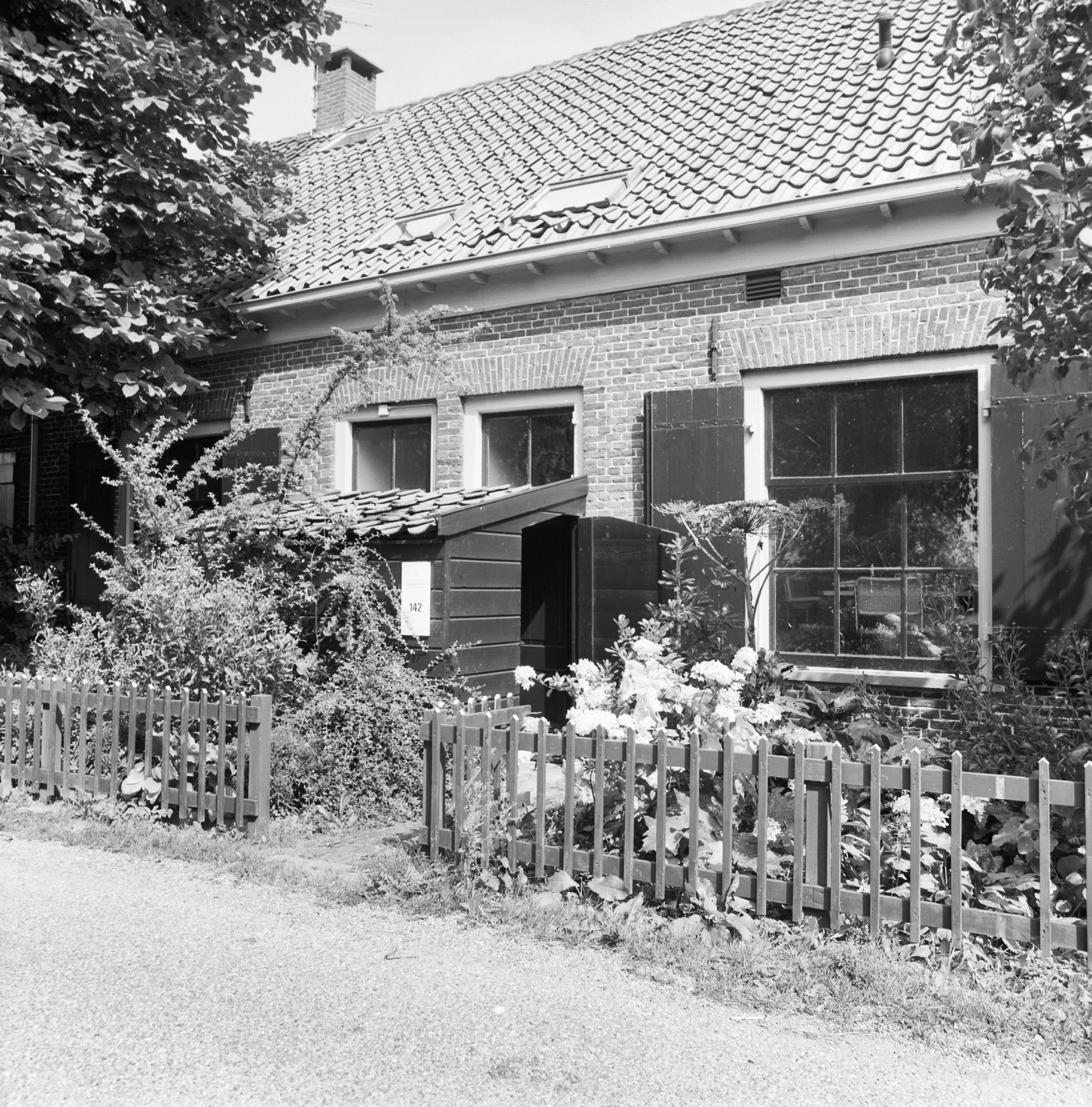 Glashut